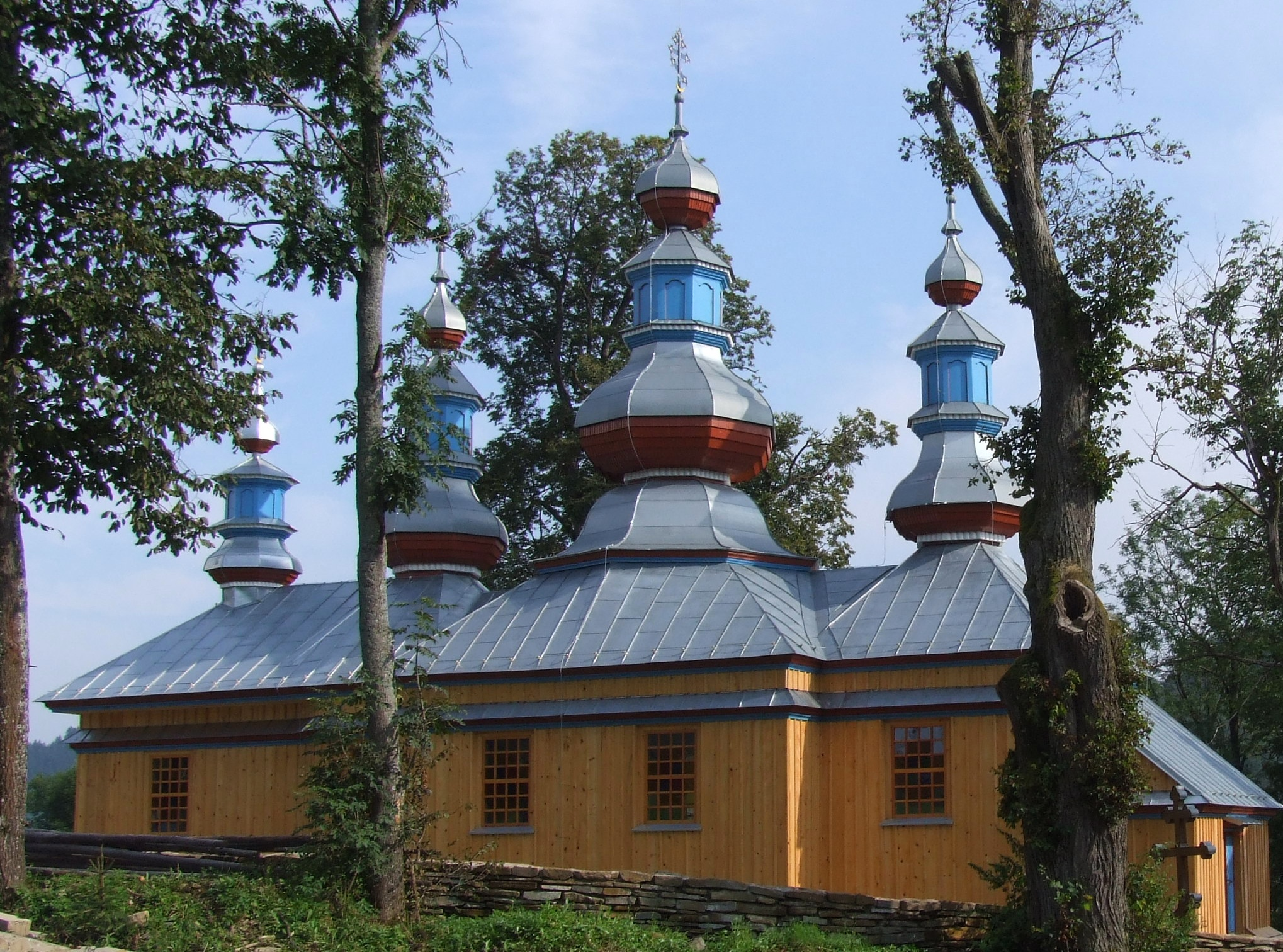 Cerkiew prawosławna w Komańczy.